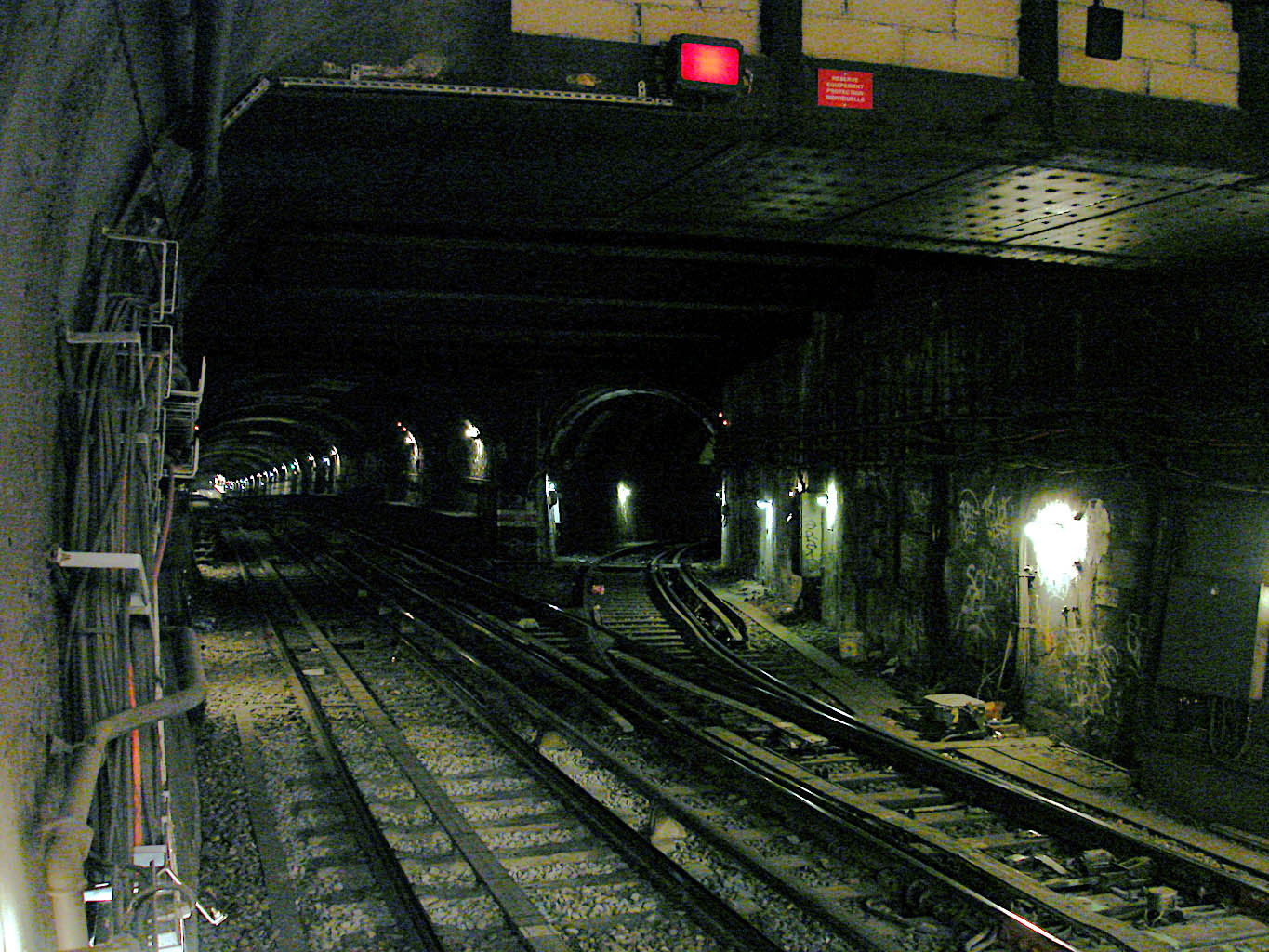 Raccordement vers la ligne 7 à l'ouest de la station Opéra, ligne 3 du métro de Paris, France.